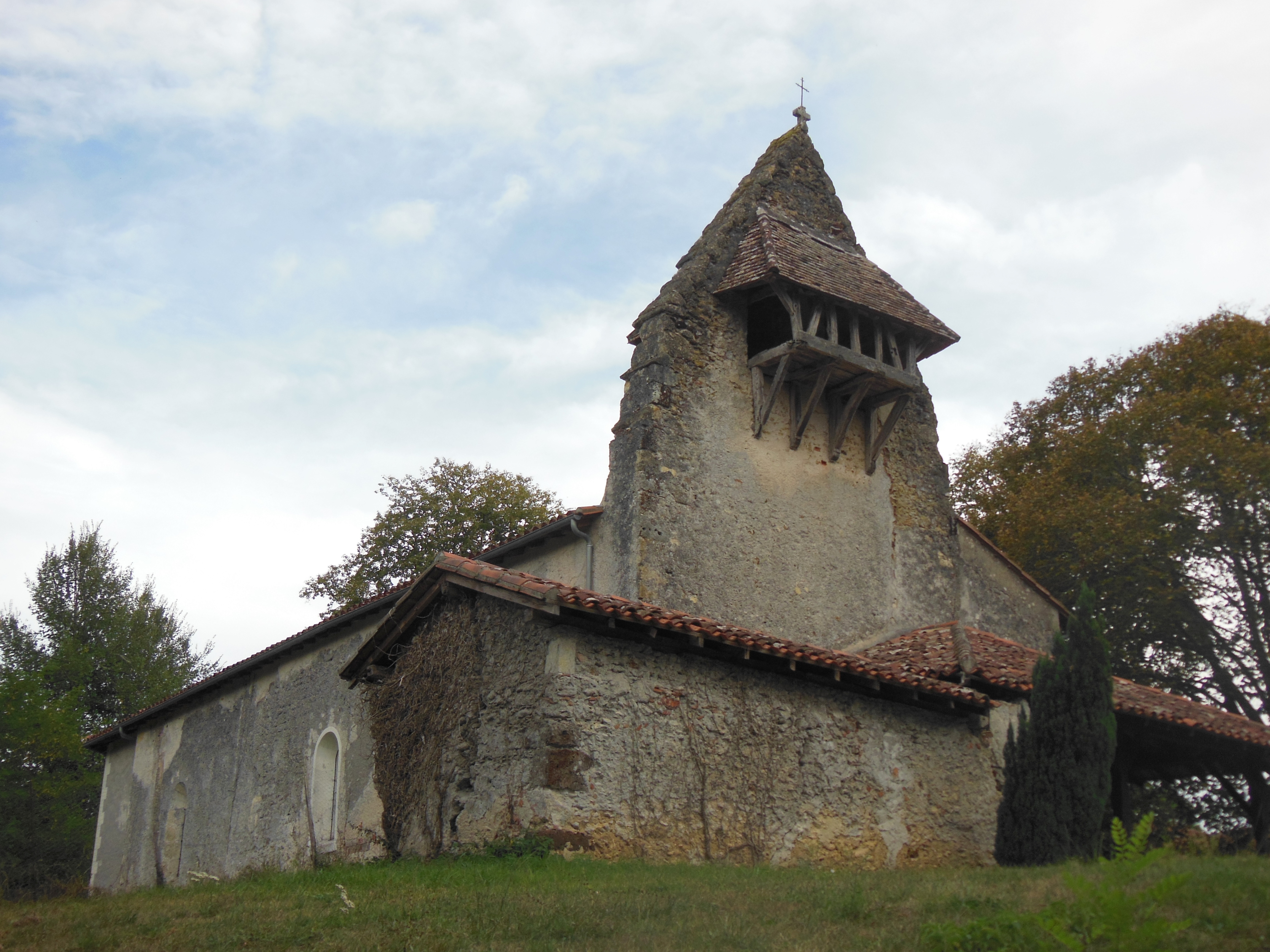 Eglise Saint-de-la-porte-latine de Bergonce, à Bourriot-Bergonce, dans le département français des Landes.